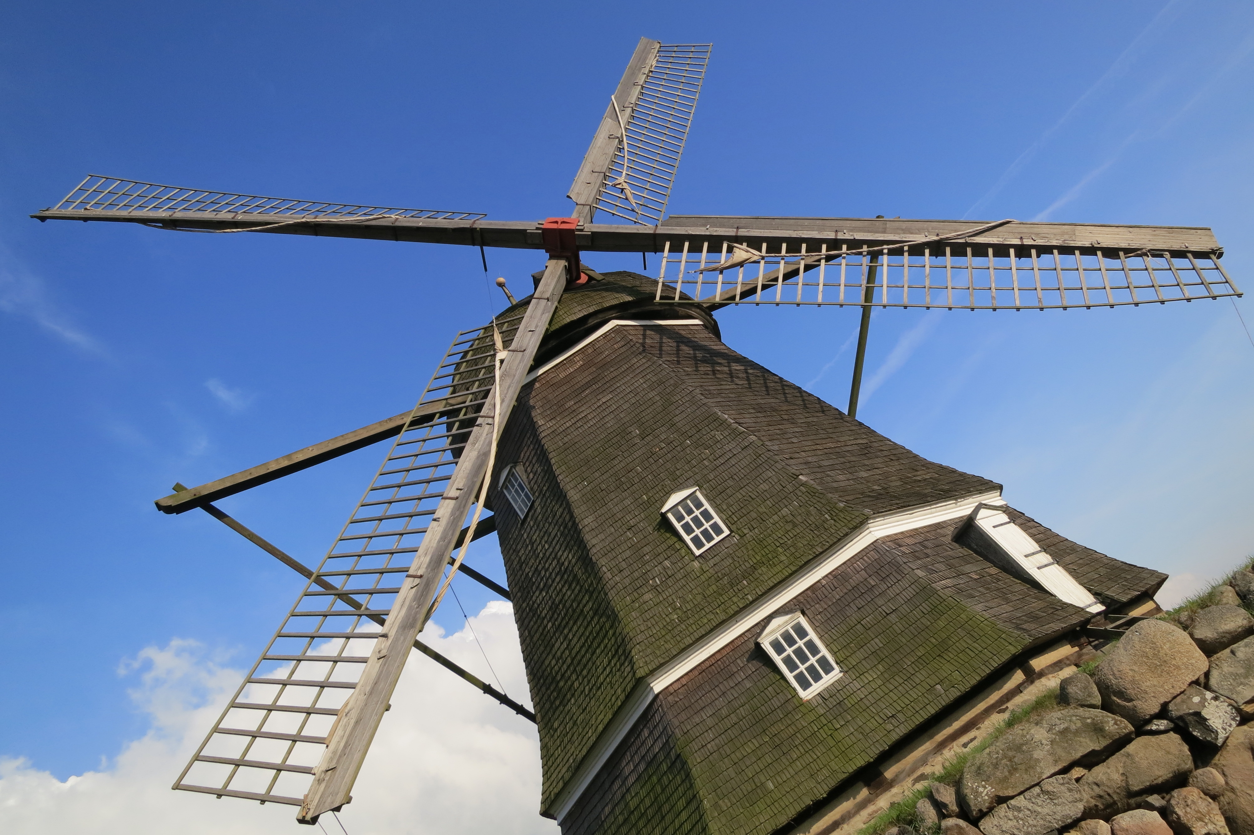 Gunnestorps mölla (Ornakärr 2:21)